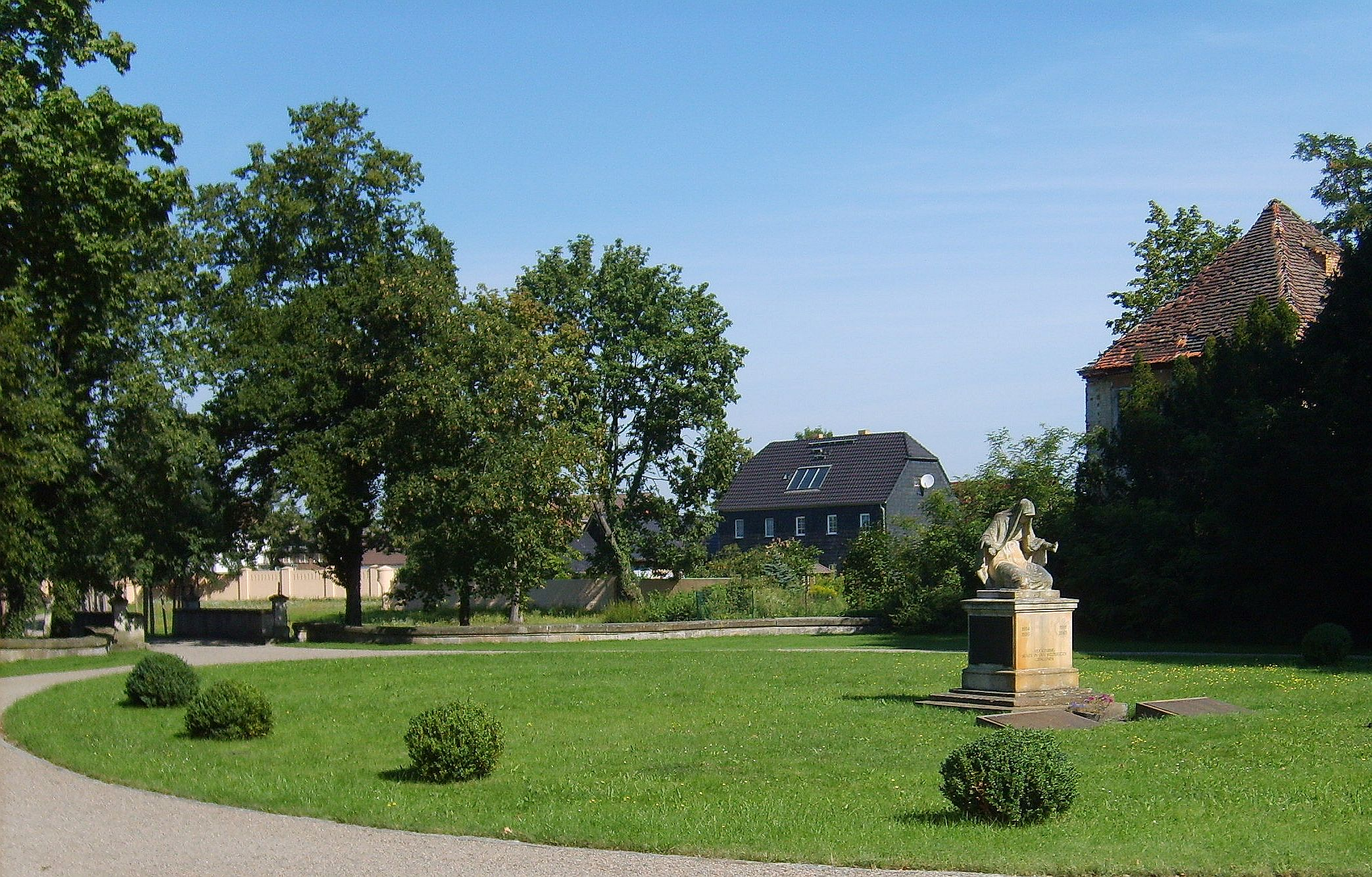 Kriegerdenkmal im Schlosspark Lauchhammer-West